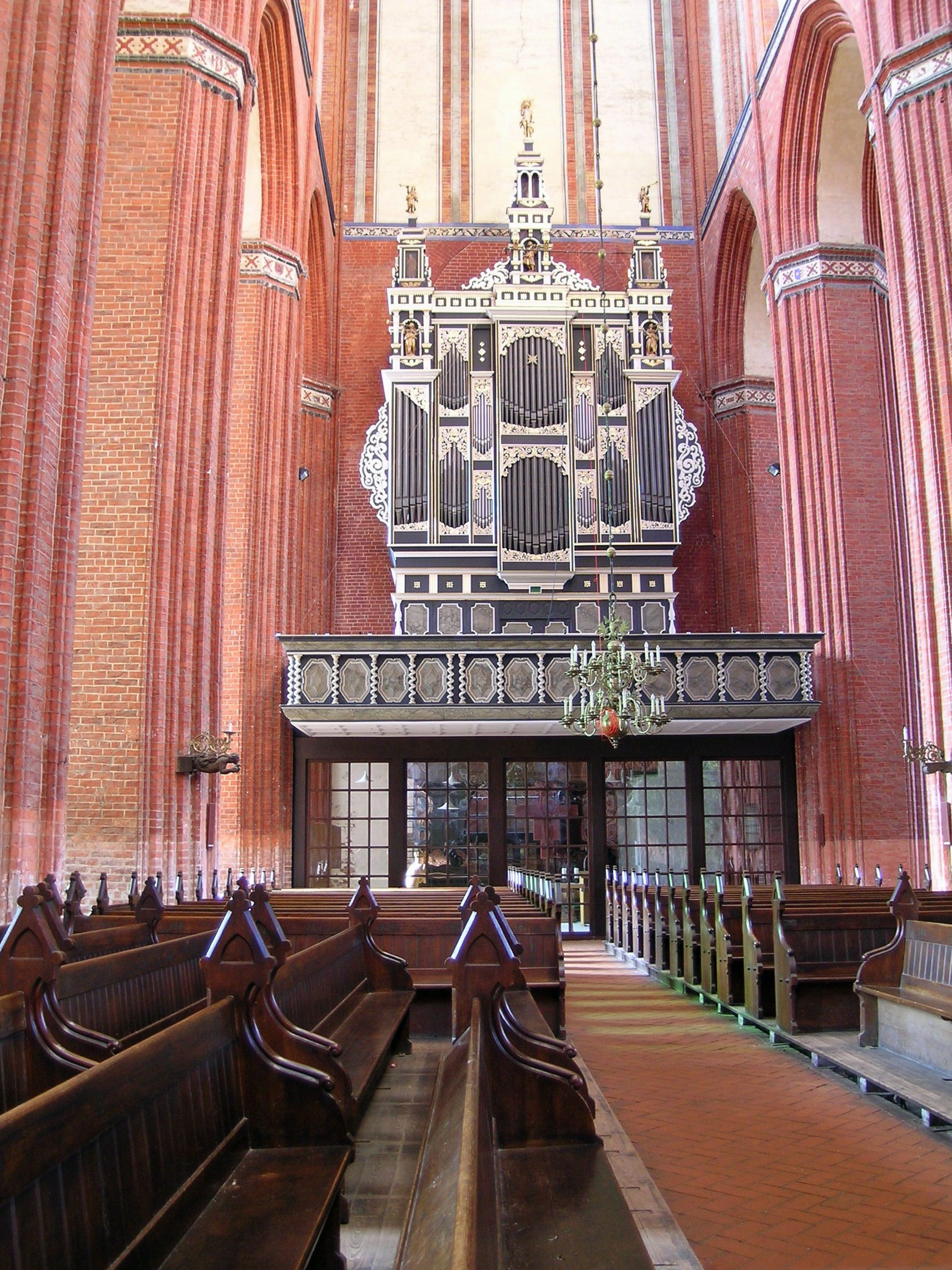 Orgel in Kirche St. Nikolai, Wismar (Germany)